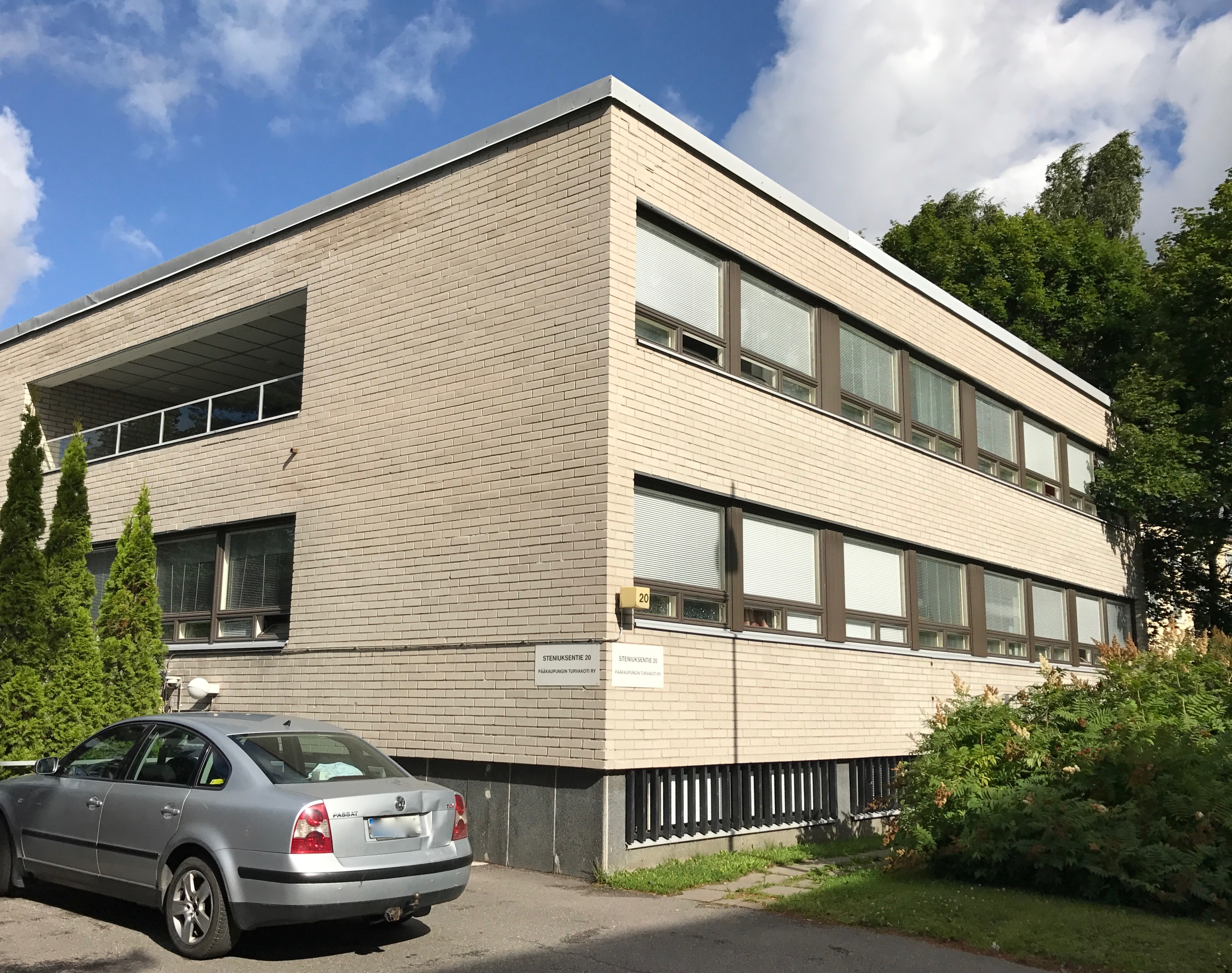 Turvakoti Haaga Helsingissä